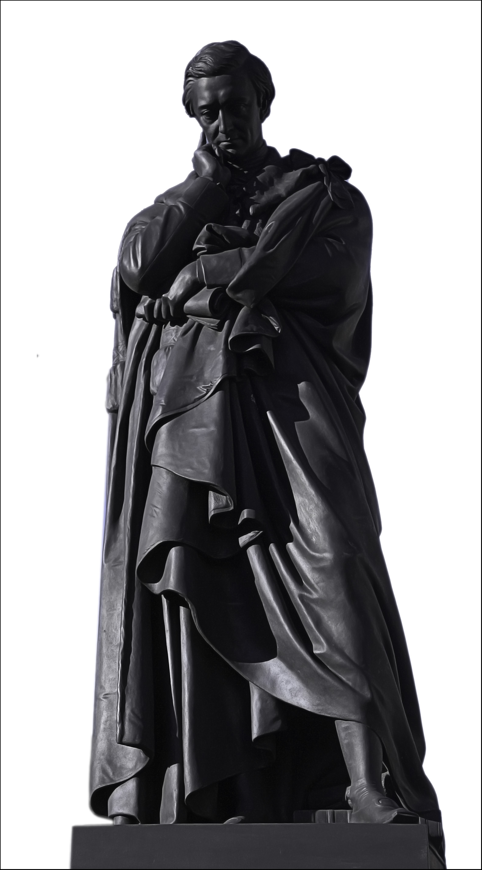 Sir Sidney Herbert